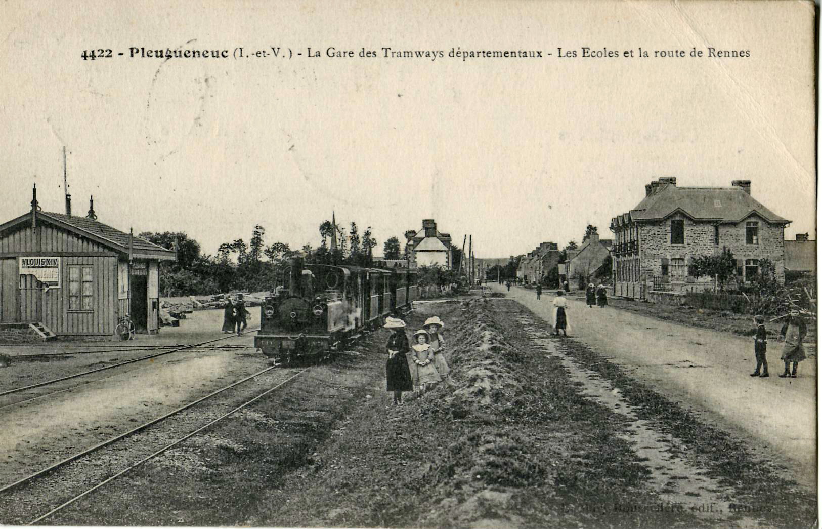 Carte postale ancienne éditée par E. Mary-Rousselière n°4422 : PLEUGUENEUC - La Gare des Tramways départementaux - Les écoles et la route de Rennes.